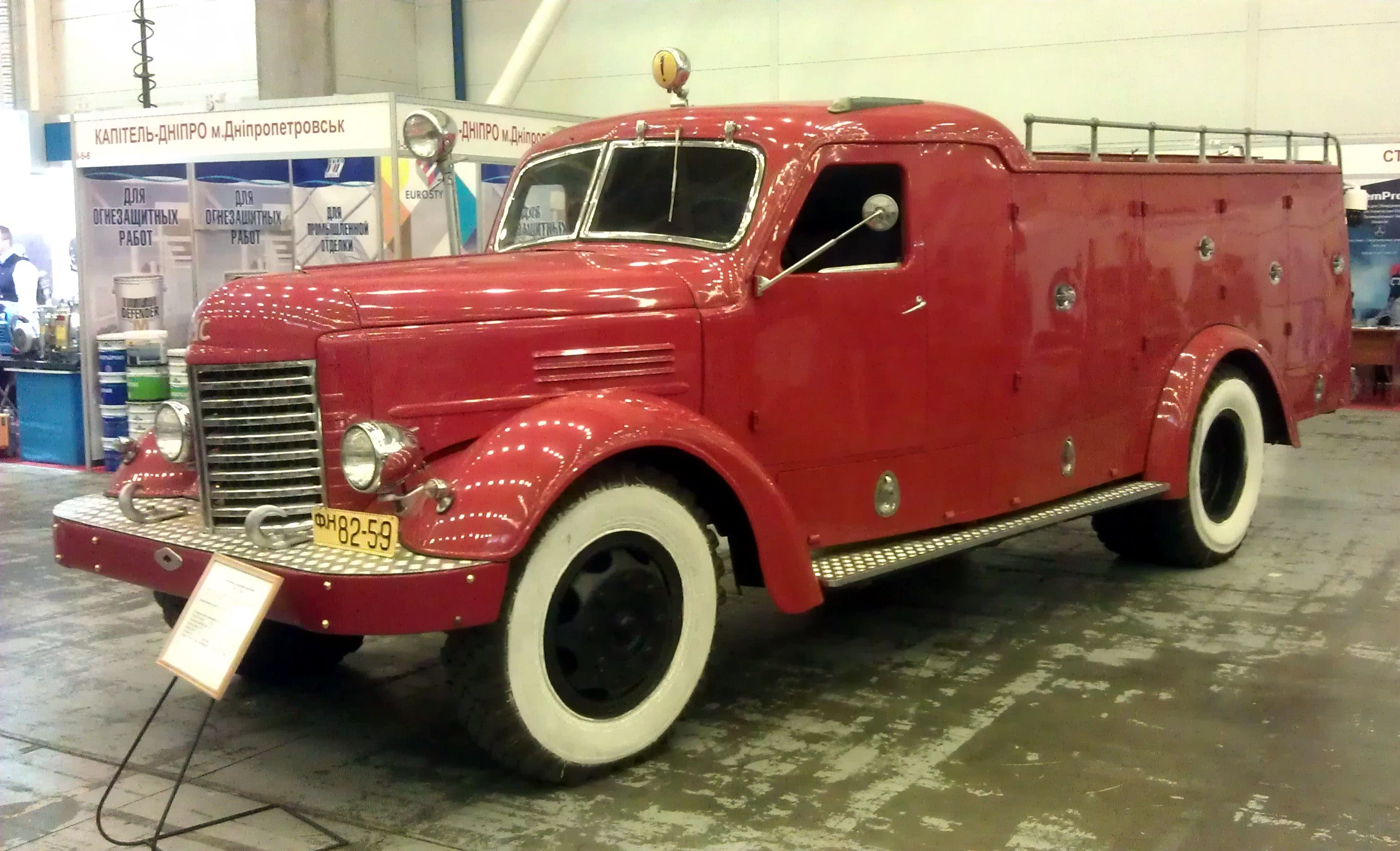 Автомобиль рукавный пожарный АРП-2 на шасси ЗИС-150 в исторической части экспозиции выставки "Зброя та безпека". Киев, сентябрь 2015 г.